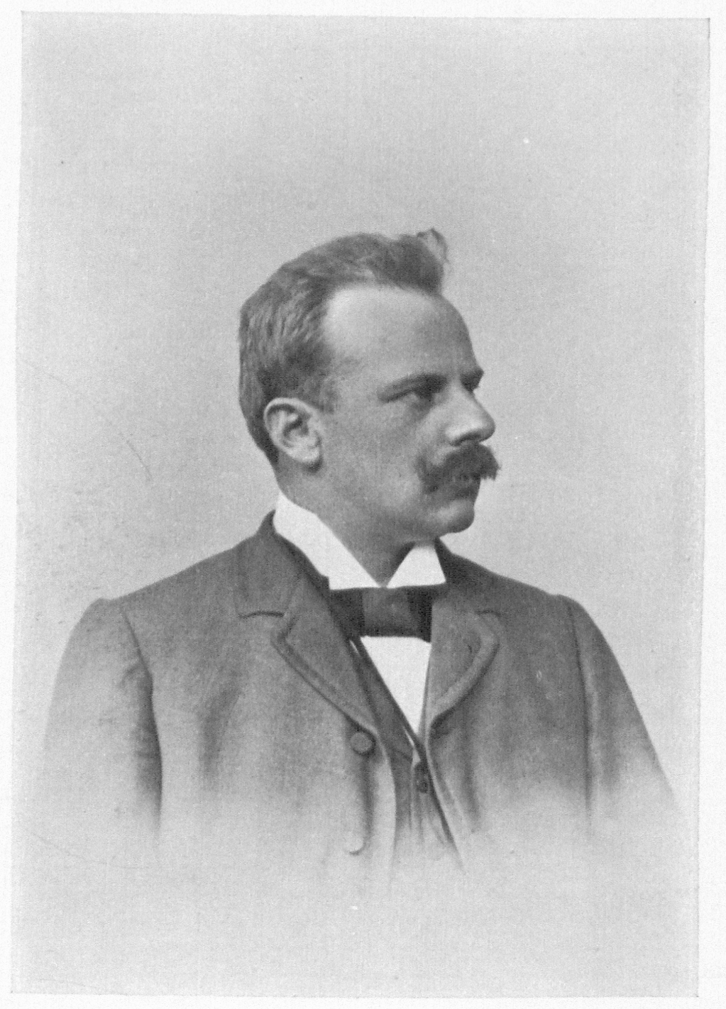 Portrait von Prof. Dr. Adolf Socin